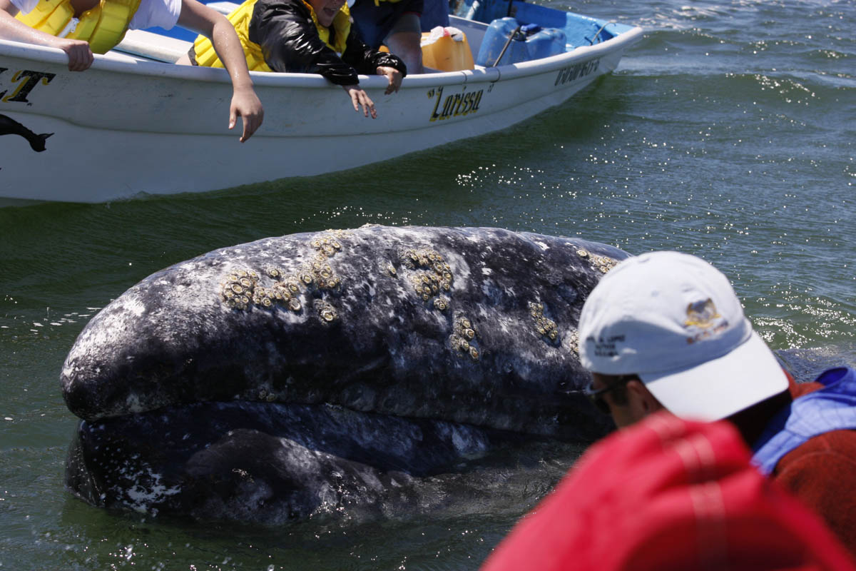 Grauwal (Eschrichtius robustus) zwischen Booten, Baja California Sur